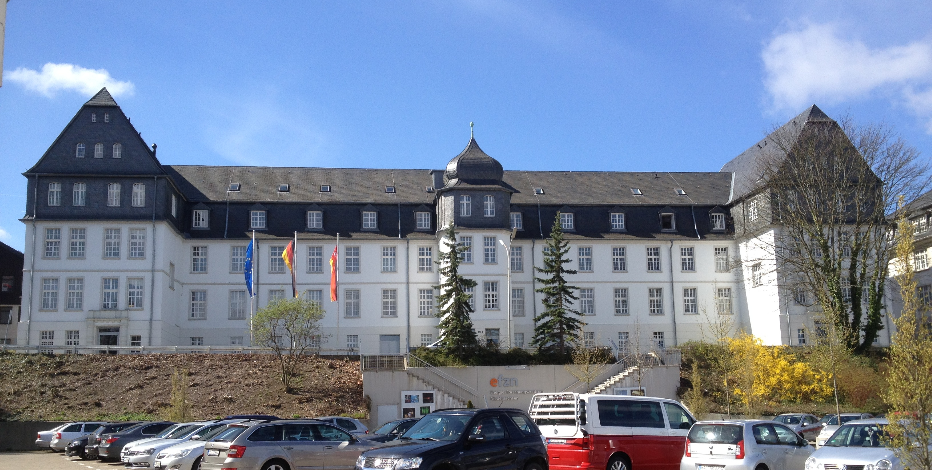 Ehemalige Rammelsberg-Kaserne, Goslar, seit 2010 EnergieCampus Goslar